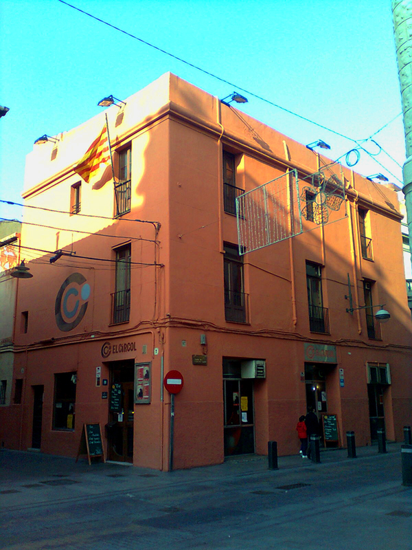 El Cercle Catòlic, carrer Francesc Layret cantonada amb Sant Anastasi.